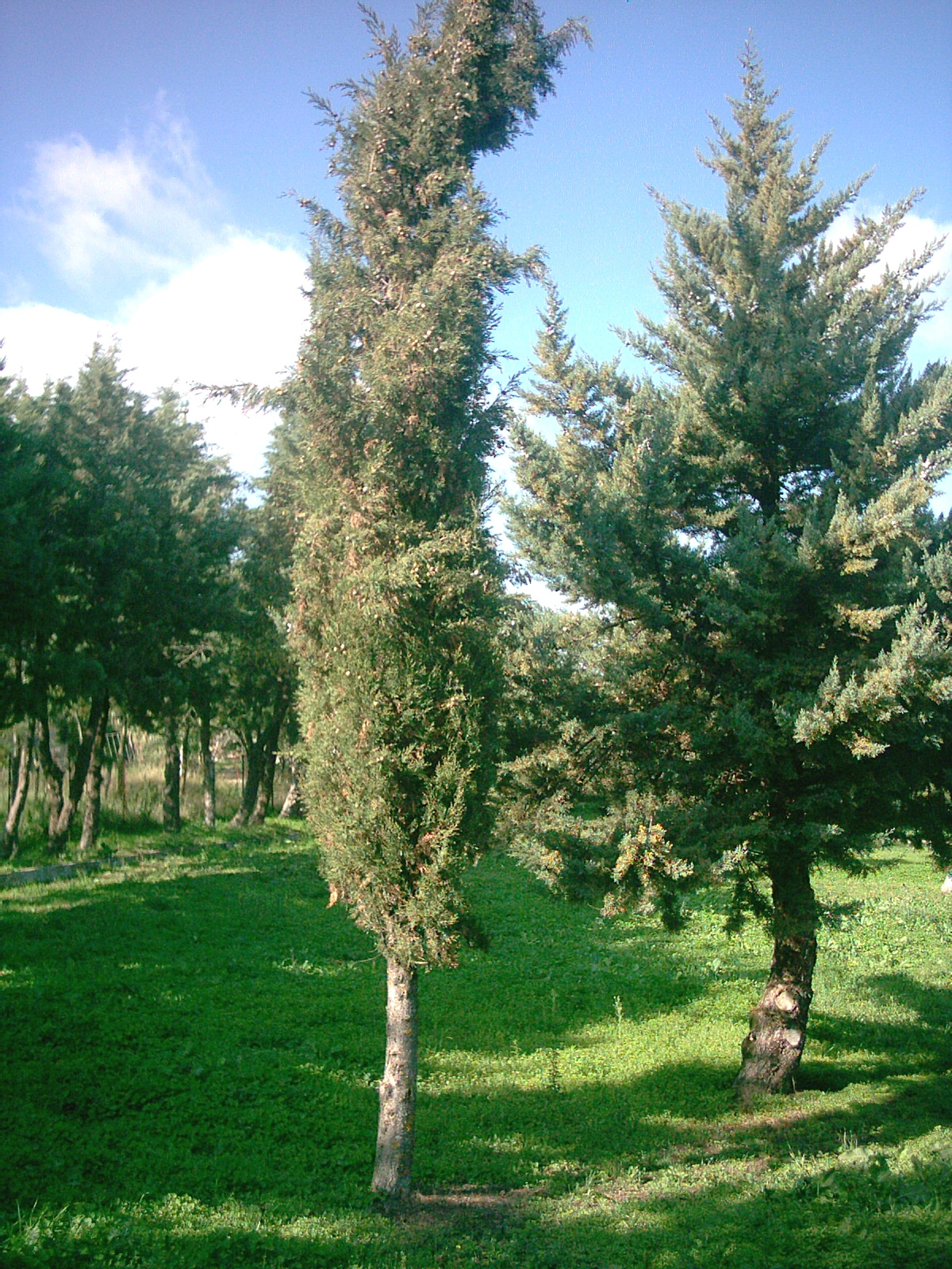 Immagine albero orto botanico